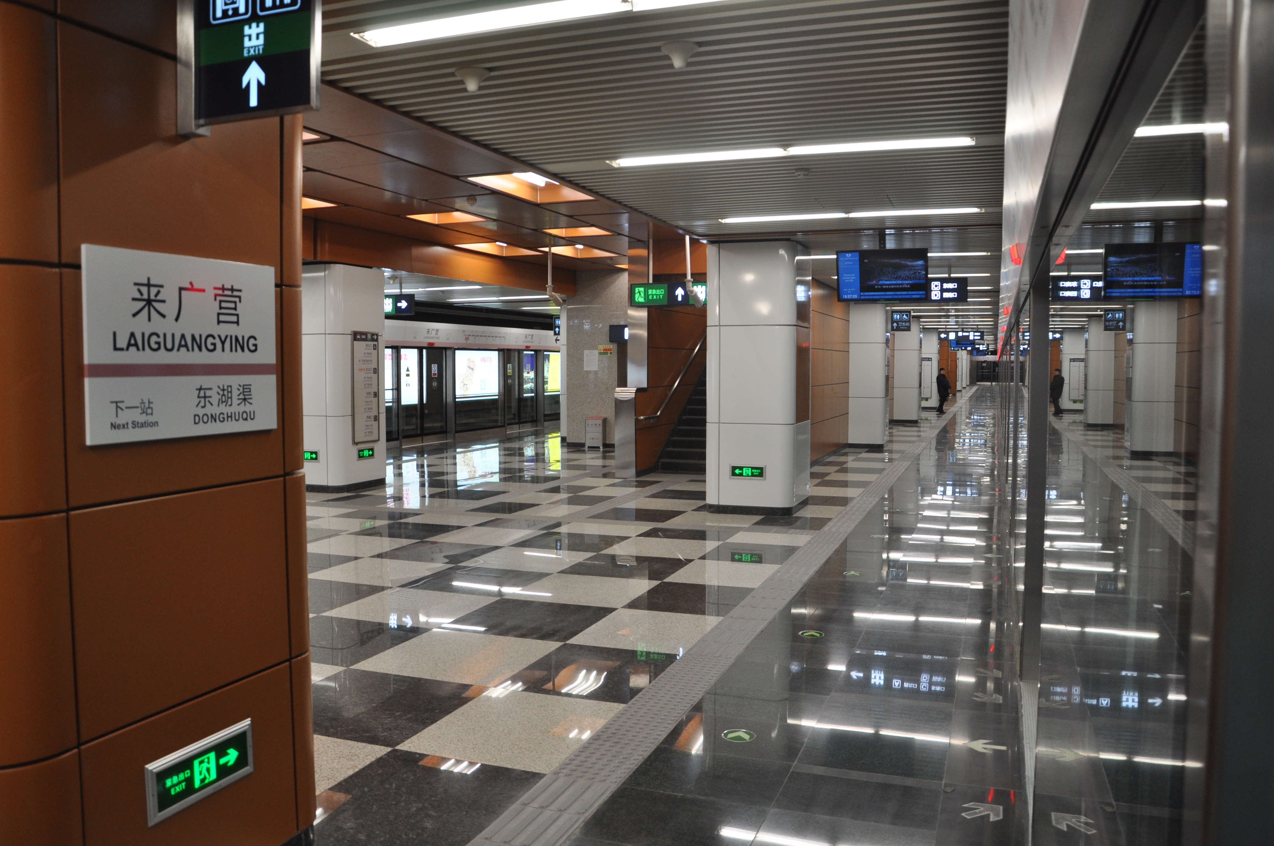 北京地铁14号线来广营站站台